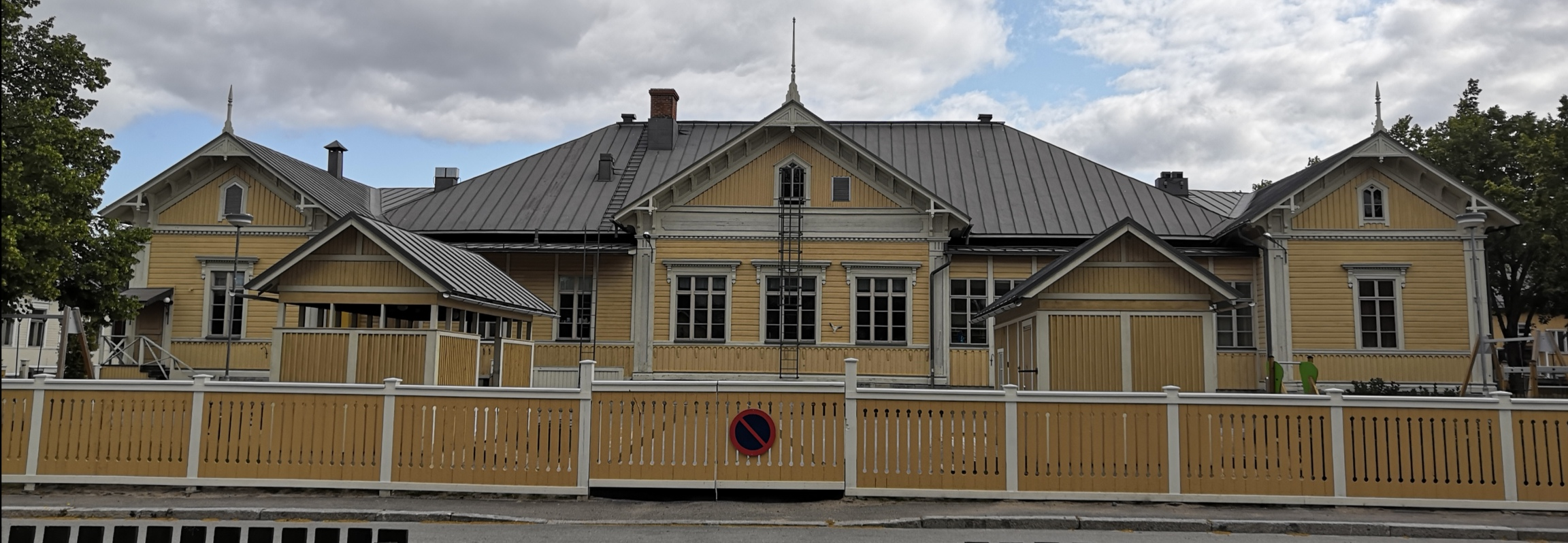 Marian kansakoulu Pietarsaaressa. Nykyään rakennuksessa toimii Marjalan päiväkoti.